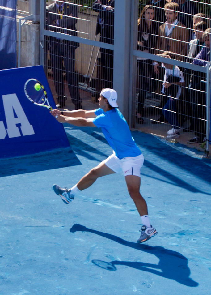 Nadal qui s'entraîne sur la terre battue bleue du Masters 1000 de Madrid